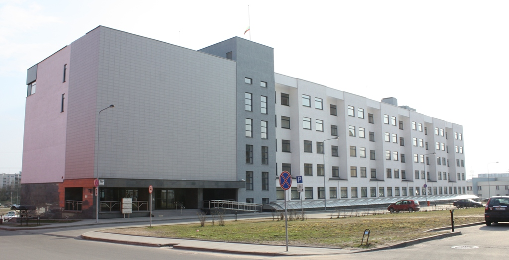 Vilniaus miesto apylinkės teismų pastatas